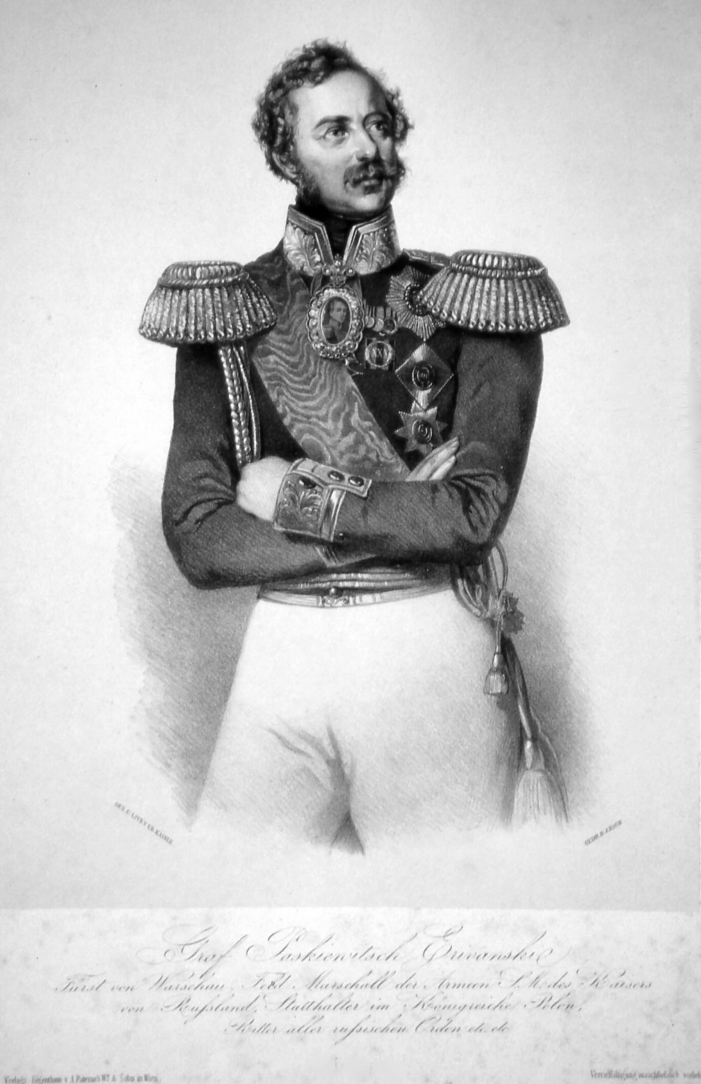 Iwan Fjedorowitsch Paskewitsch, (1782-1856), Graf von Eriwan, Fürst von Warschau, Lithographie von Eduard Kaiser, um 1850.